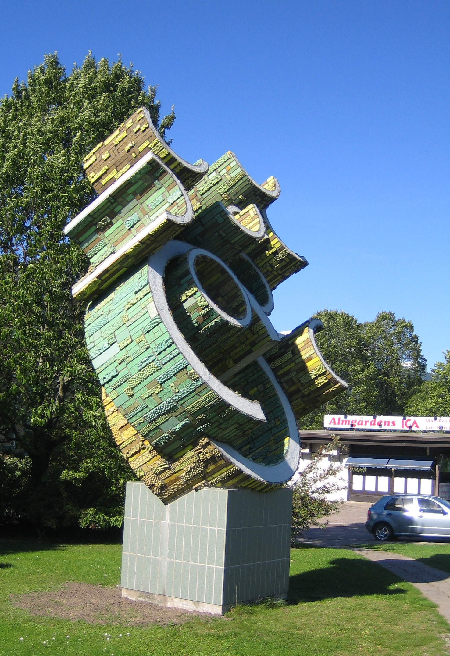 Almgården, Malmö, Sweden